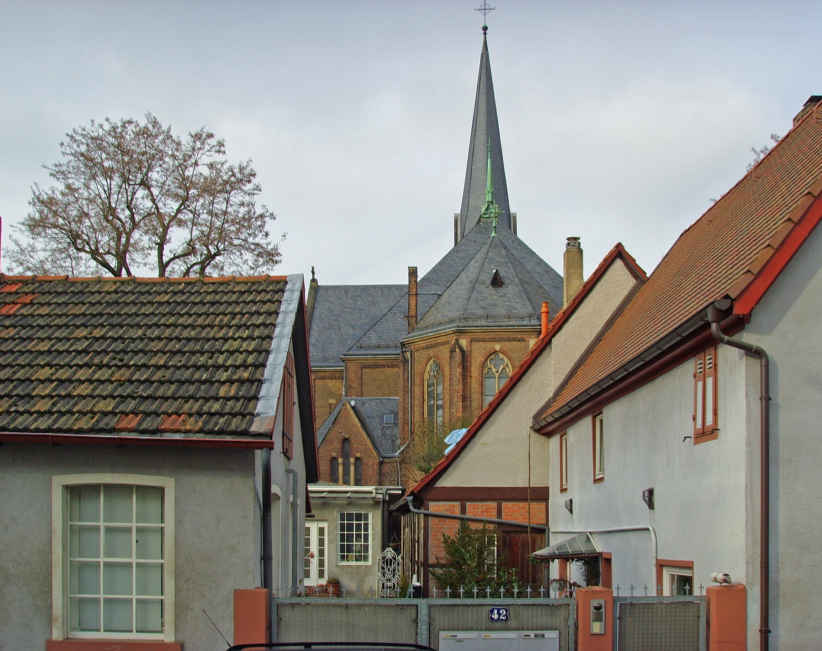 Frankfurt am Main-Heddernheim, Blick von der Straße Alt Heddernheim nach Norden zur katholischen Kirche St. Peter und Paul